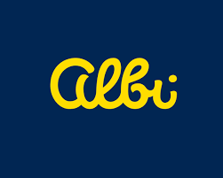 Logo vydavatelství her - Albi